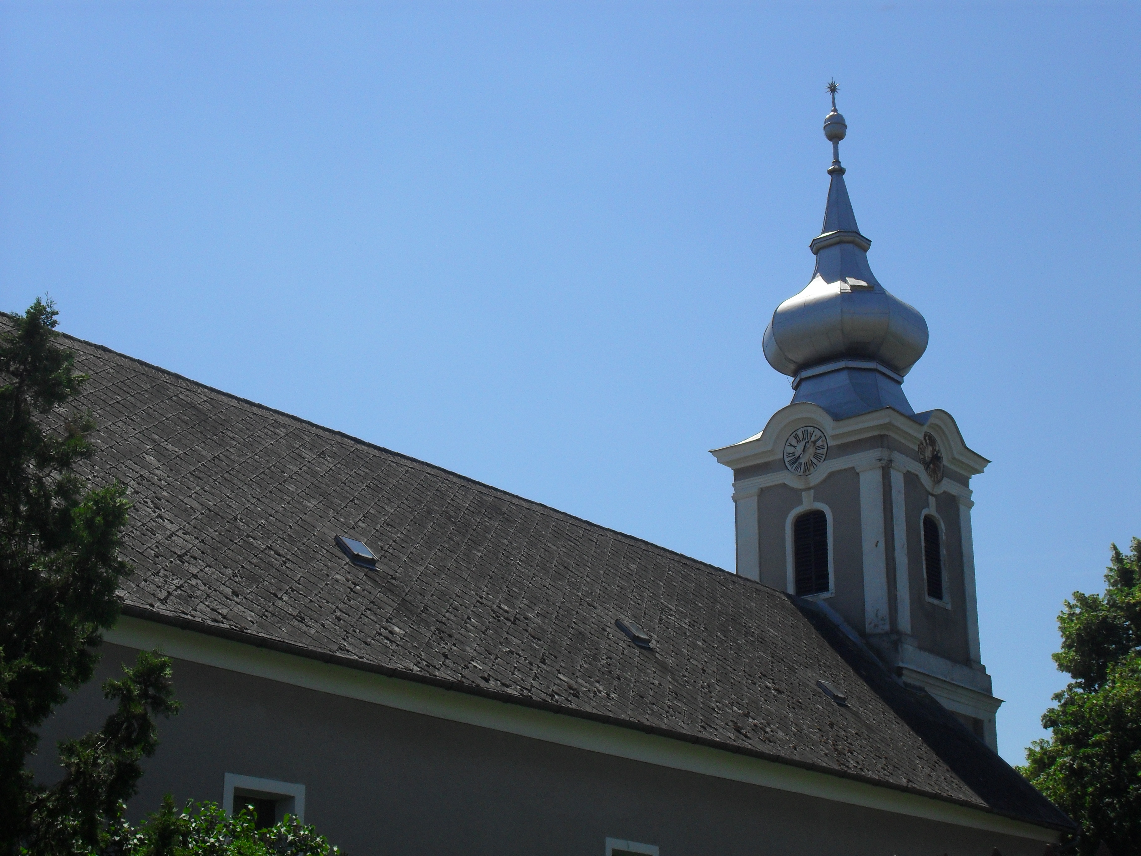 Hetény - református templom